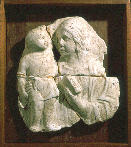 Scène biblique saint Anne apprenant à lire à Jésus, sculpture en platre par Enrico Campagnola.